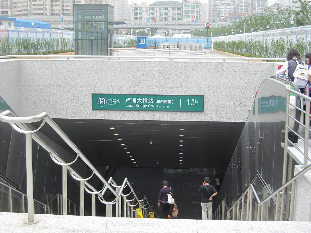 description